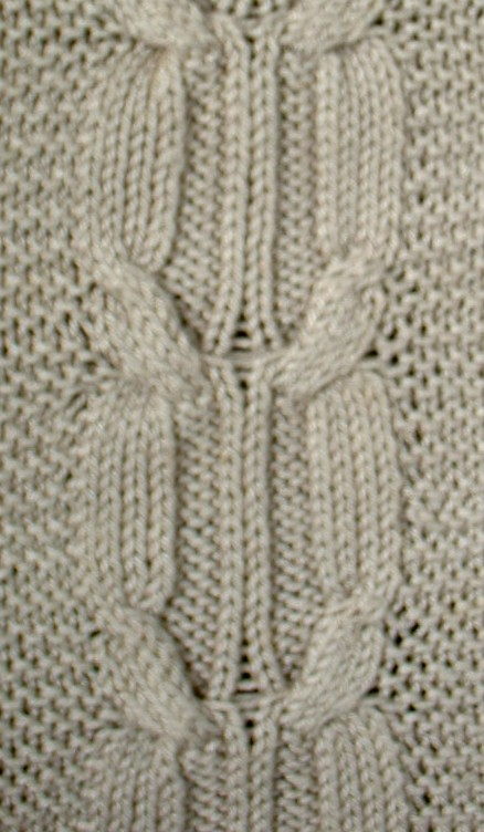 Zopfmuster handgestrickt